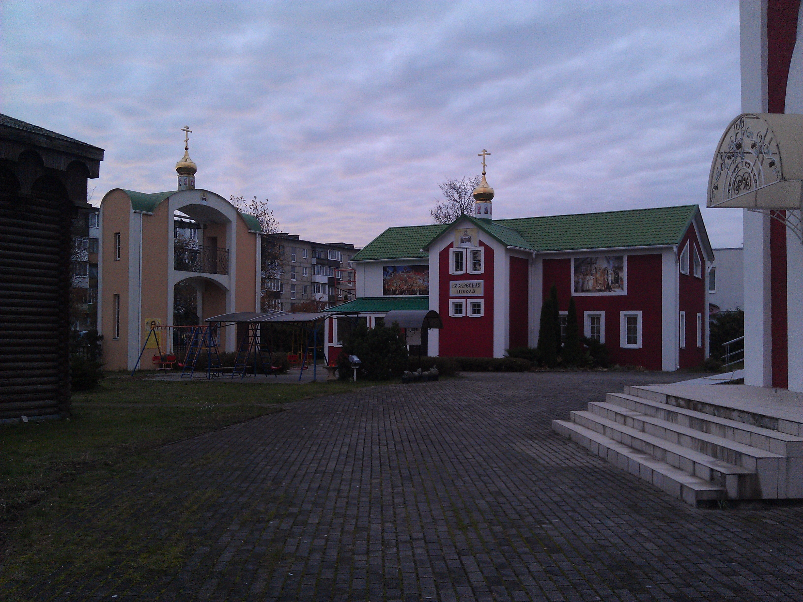 Врата-звонница и дом причта на территории прихода святой Варвары